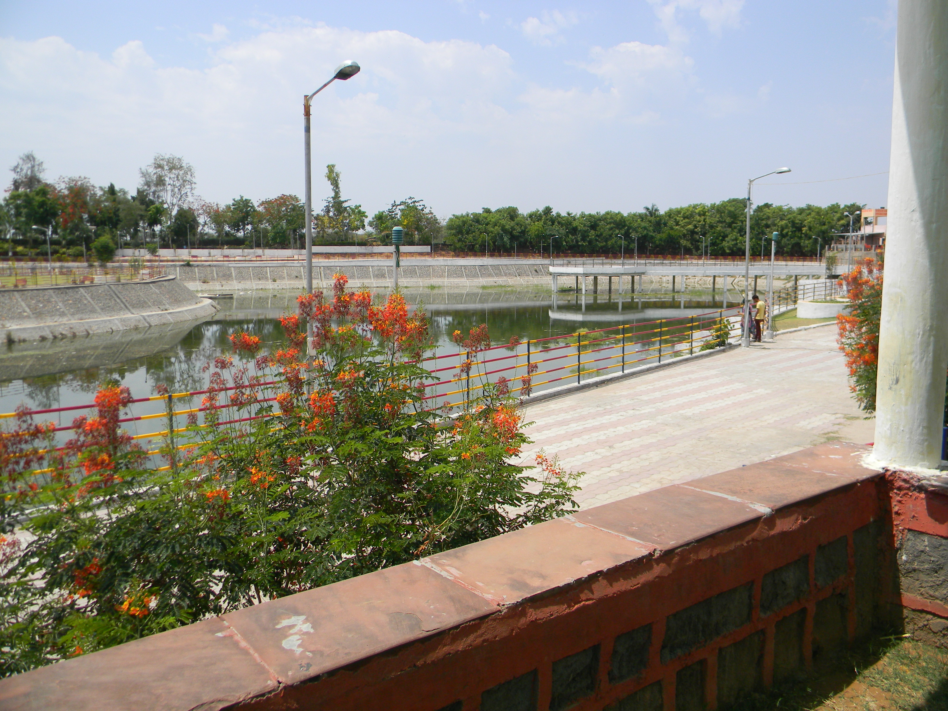 Modasa Odhari Lake